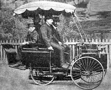 Quadricycle à vapeur "Dog-Car" De Dion-Bouton de 1885 (vainqueur de course en 1887), Histoire de l'automobile, Pierre Souvestre, éd. H. Dunod et E. Pinat, 1907 (ASIN B001BPBE58) p.151